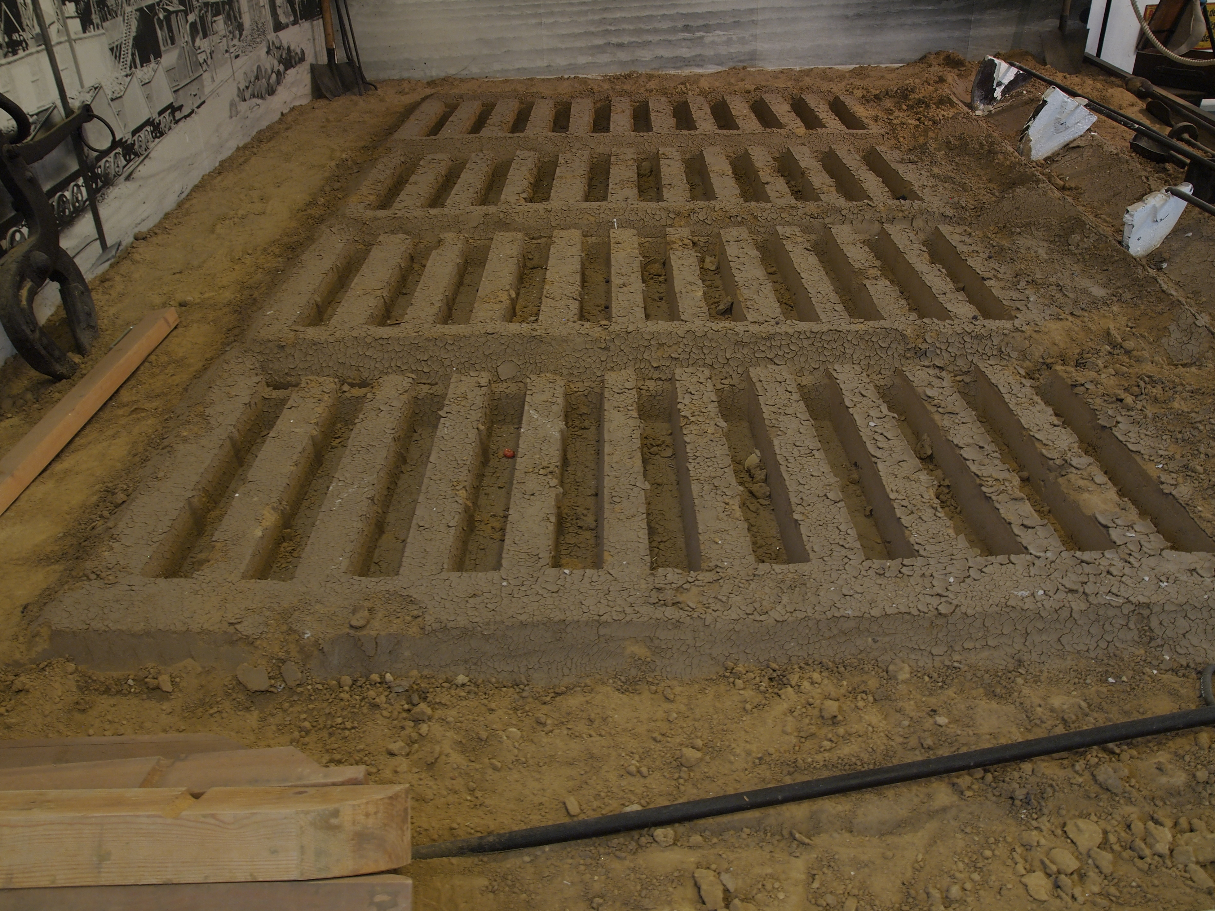 Lübeck, nachgebautes Masselbett im Industiemuseum Geschichtswerkstatt Herrenwyk, rechts die Ballerspaten zur Steuerung des flüssigen Roheisens in die Zulaufrinnen